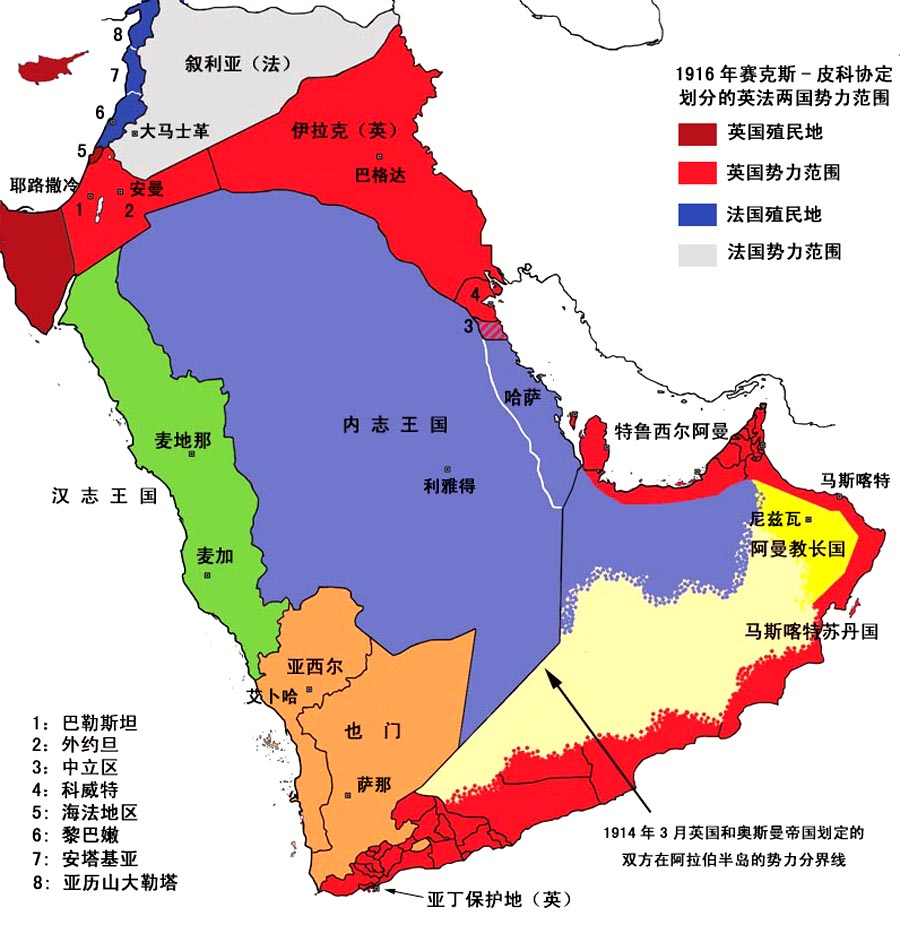 1919年的阿拉伯半島政治地圖 圖例說明 1916年，英國與法國簽訂《賽克斯-皮科協定》，秘密劃分戰後兩國在土耳其所屬的阿拉伯領土上的勢力範圍。《賽克斯-皮科協定》規定巴勒斯坦、外約旦、伊拉克為英國的勢力範圍，其中巴勒斯坦的zh:海法地區和伊拉克的美索布達米亞由英國直接統治；巴勒斯坦以北的地中海東岸為法國直接統治的區域，內陸則為法國勢力範圍。 1919年，英法按照《賽克斯-皮科協定》的精神對兩國在阿拉伯半島北部的勢力範圍進行了劃分。英國獲得對巴勒斯坦、外約旦、伊拉克的委任統治權力，法國獲得對敘利亞、黎巴嫩、安塔基亞和亞歷山大勒塔的委任統治權。 1919年至1925年間，阿拉伯半島的政治邊界進行了多處調整：法國在敘利亞南部建立了自治的zh:德魯茲國家；敘利亞東部盛產石油的zh:摩蘇爾地區歸伊拉克；漢志王國被內志王國佔領後，英國獲得了亞喀巴地區，將其併入外約旦；亞西爾國和也門的北部地區被內志王國吞併；zh:1922年在伊拉克和內志的邊界、以及科威特與內志的邊界上劃定了兩處zh:中立區（科威特與內志之間的中立區在1914年之前即已存在，但沒有法律上的條文作為其存在依據）。